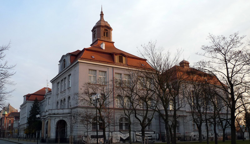 Gymnázium Plzeň, Mikulášské nám. 23